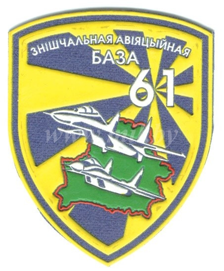 Нарукаўны знак 61 знішчальнай авіяцыйнай базы